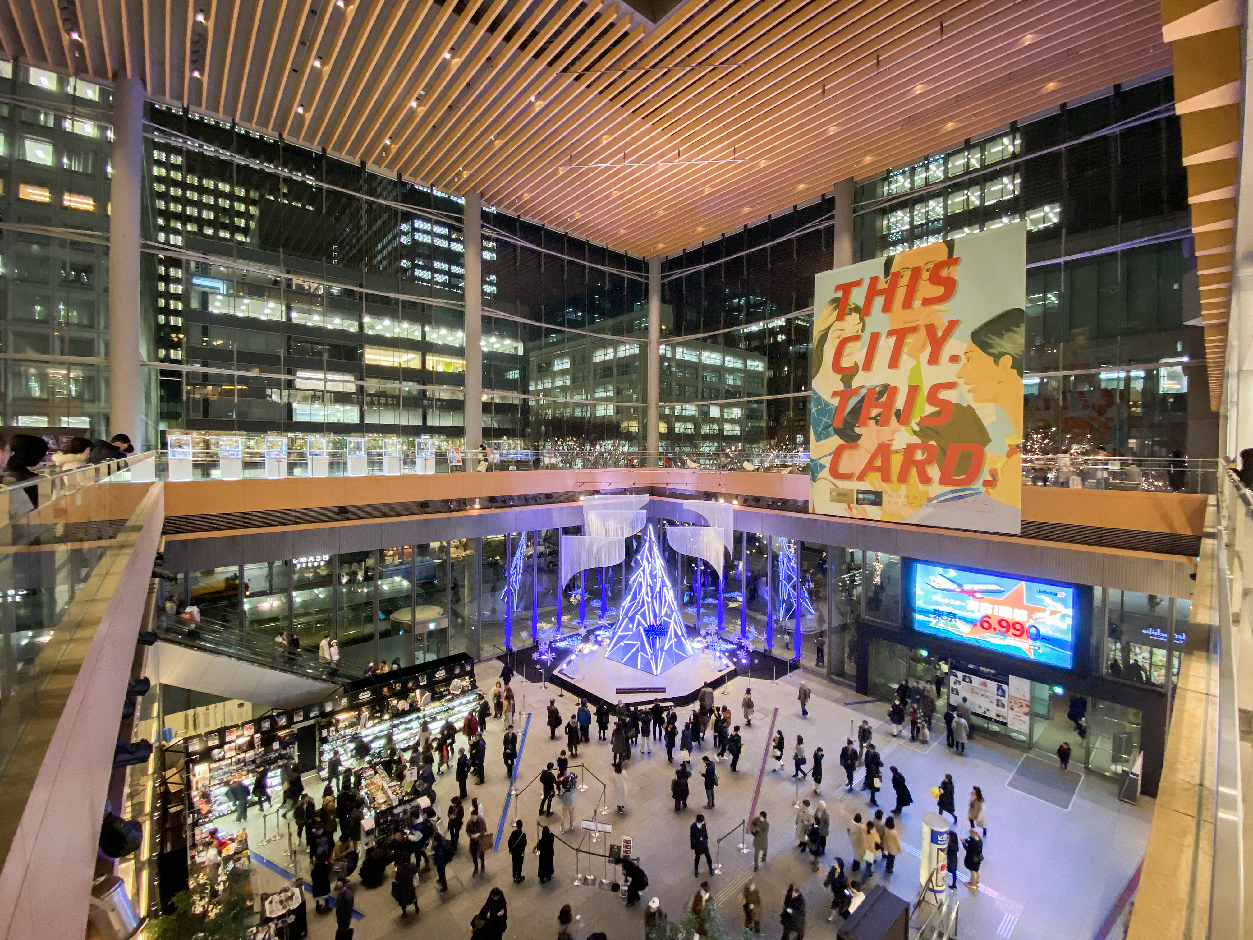 Marunouchi Building Atrium